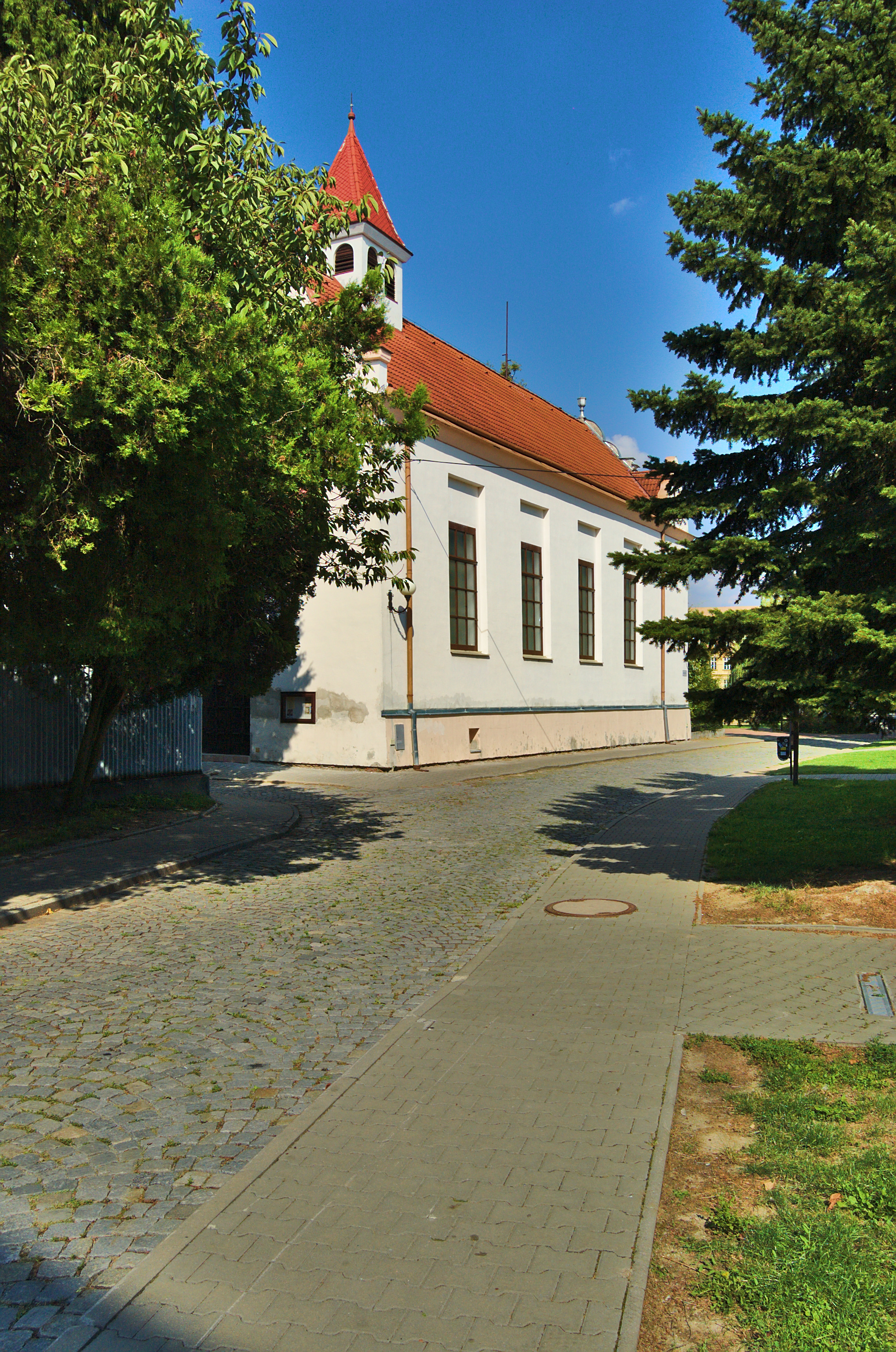 Husův sbor, Litovel, okres Olomouc